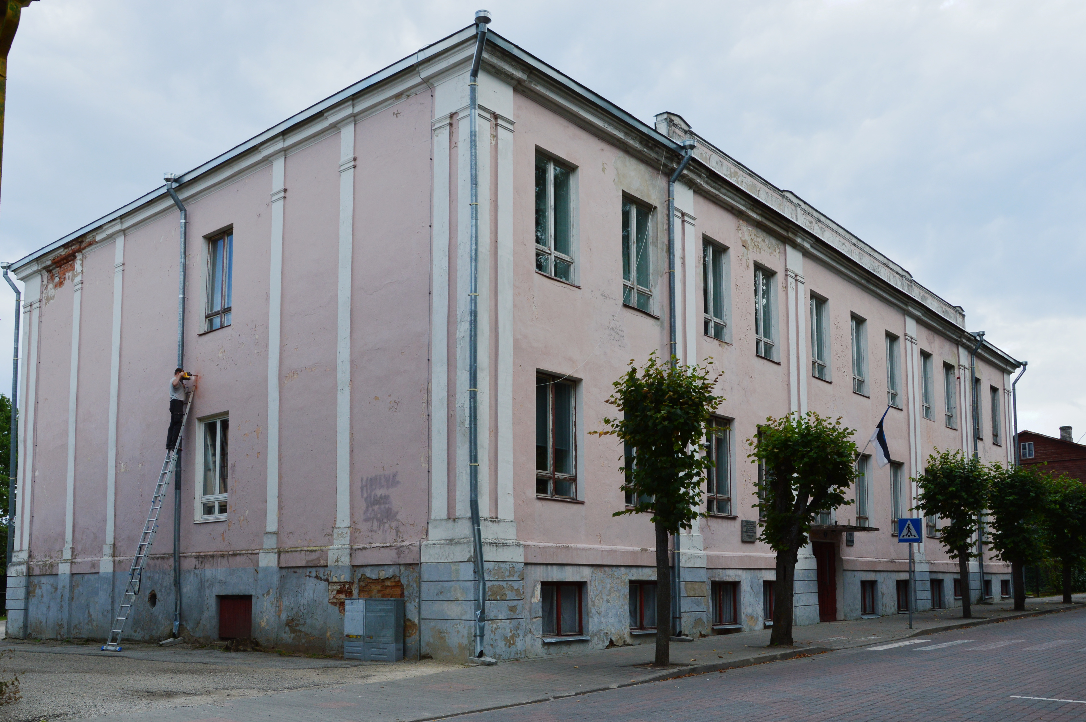 Võru I Põhikool. Vanim hoone Võrus.